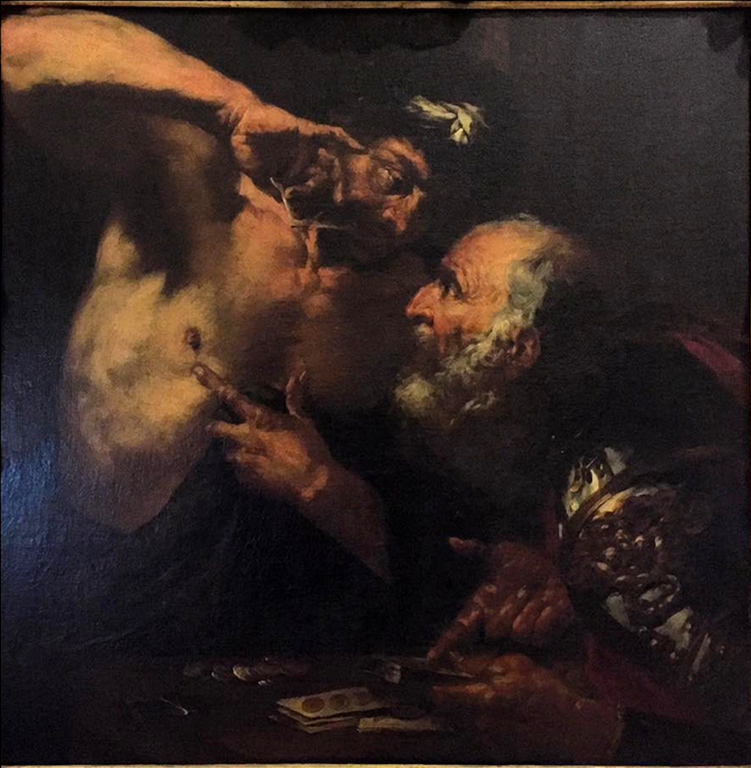 Due giocatori